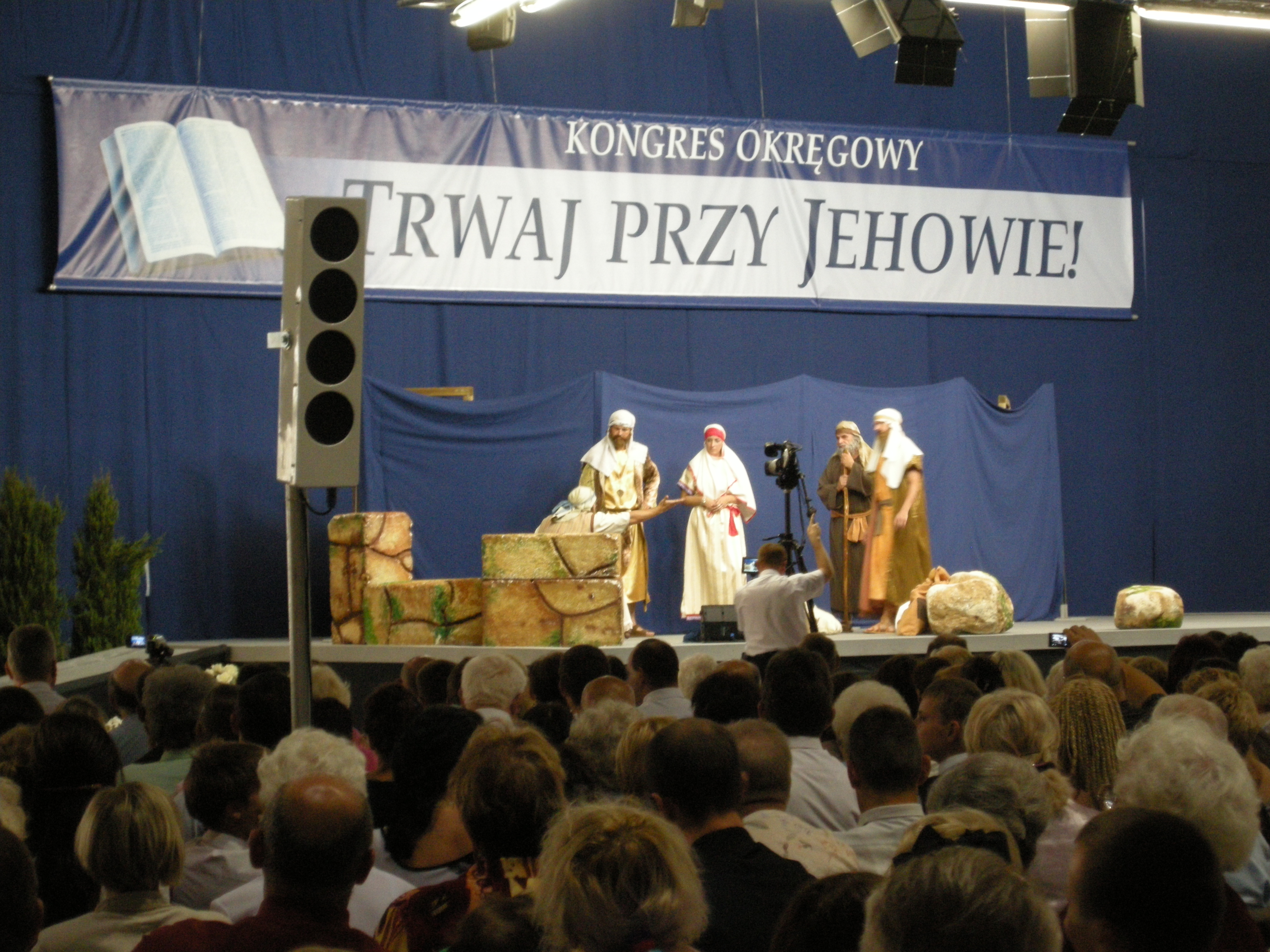 Dramat biblijny. Kongres "Trwaj przy Jehowie!" w Poznaniu. Teren Międzynarodowych Targów Poznańskich. Rok 2010.